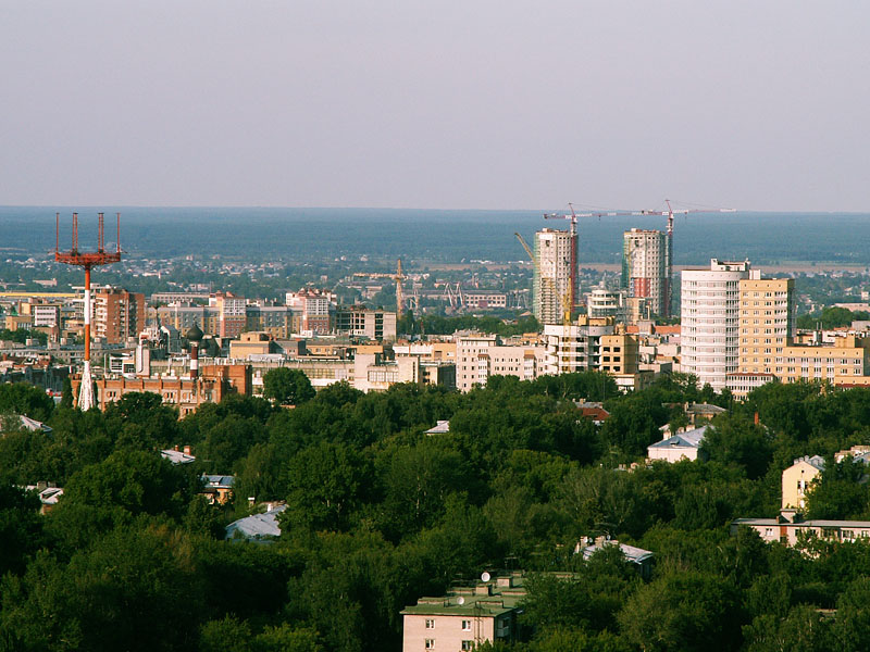 Вид в сторону ул. Варварской и пл. Сенной.